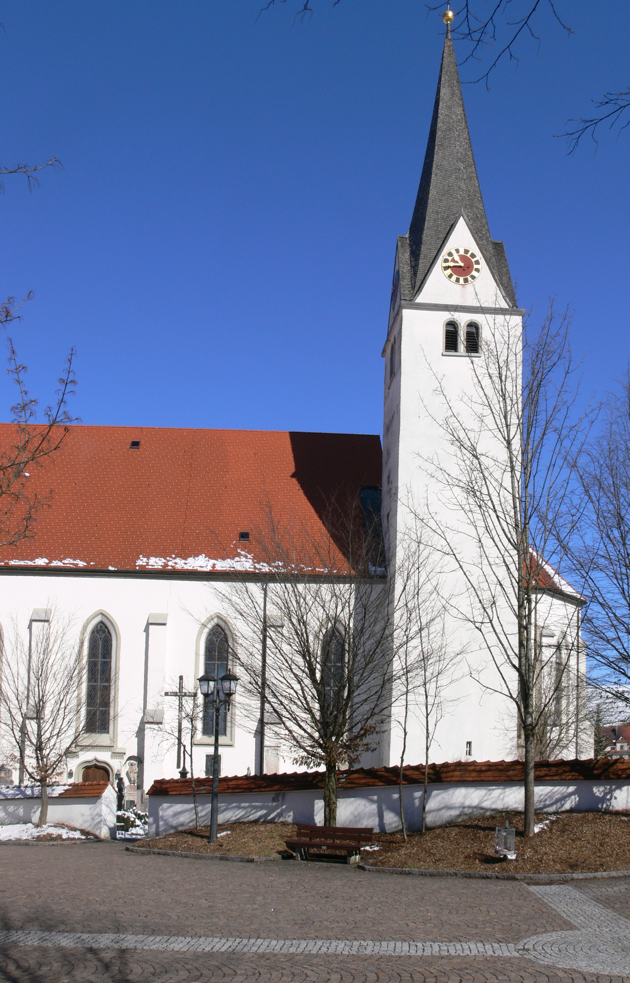 Pfarrkirche St. Margareta, Heimenkirch, Landkreis Lindau, Bayern Außenansicht mit Turm